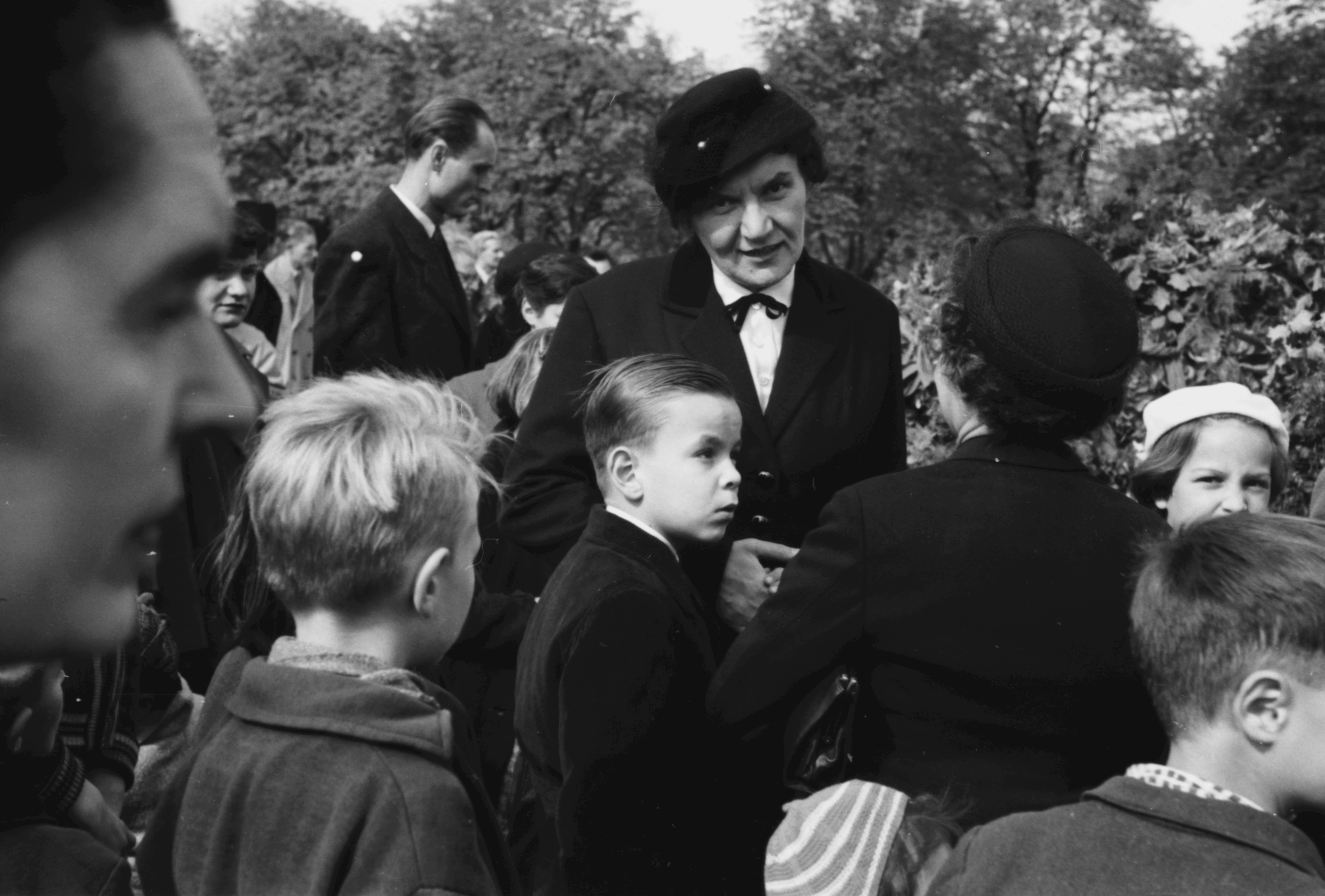 Fiumei úti Nemzeti Sírkert (Kerepesi temető), Rajk László, Pálffy György, Szőnyi Tibor és Szalai András újratemetésekor 1956. október 6-án. Szemben Rajk Lászlóné és ifj. Rajk László, háttal Pálffy Györgyné. Location: Hungary, Budapest VIII. Tags: Budapest Title: Fiumei úti Nemzeti Sírkert (Kerepesi temető), Rajk László, Pálffy György, Szőnyi Tibor és Szalai András újratemetésekor 1956. október 6-án. Szemben Rajk Lászlóné és ifj. Rajk László, háttal Pálffy Györgyné.